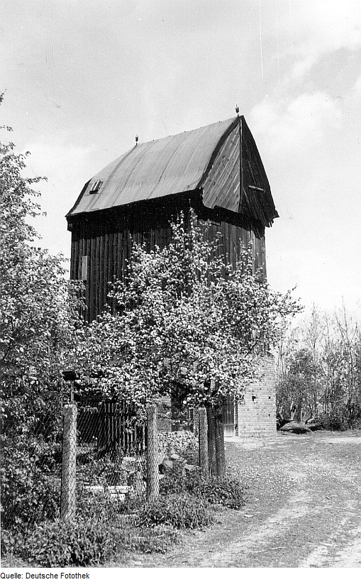 Original image description from the Deutsche Fotothek Bersteland-Niewitz. Ehem. Bockmühle